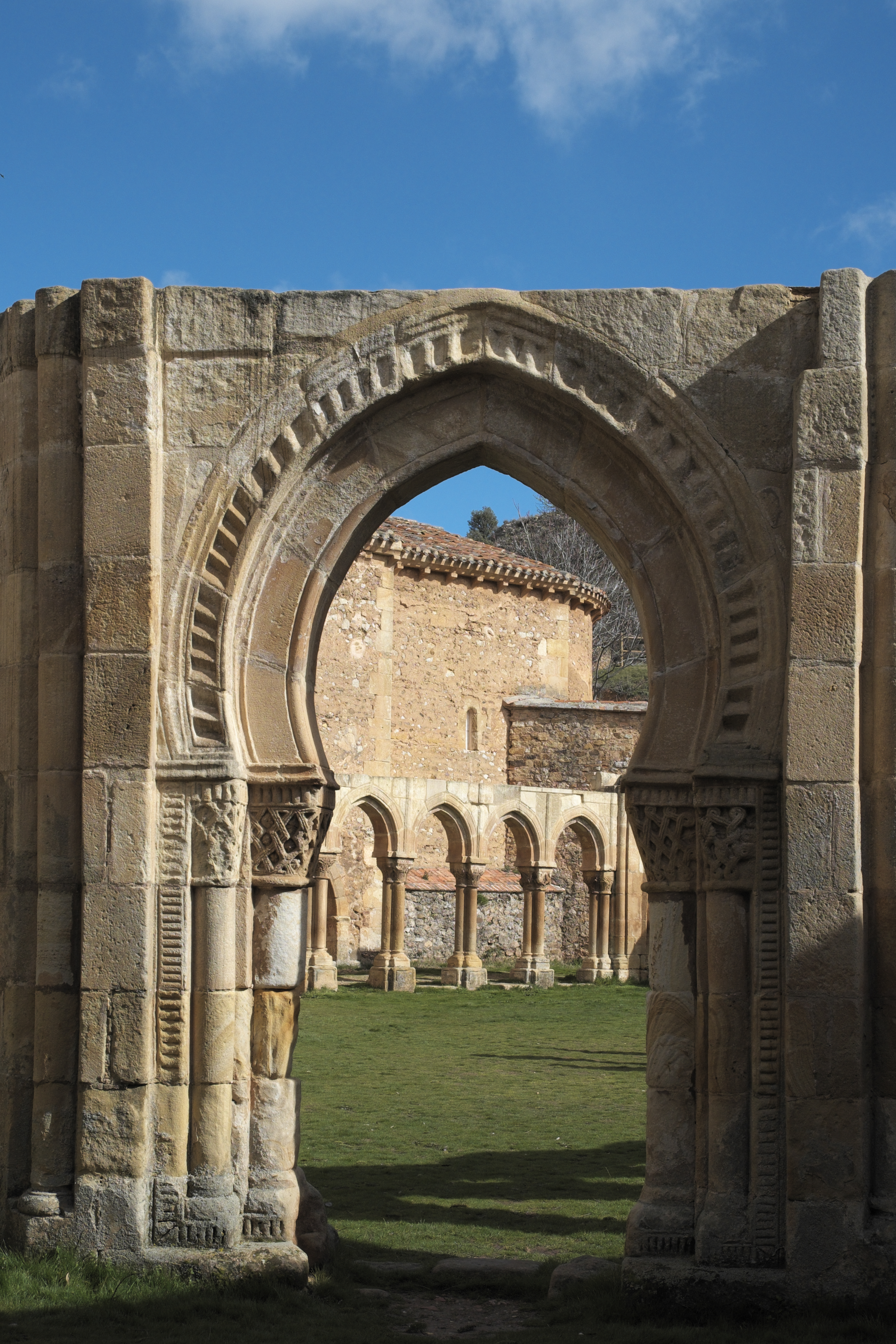 Kreuzgang des ehemaligen Johanniter-Klosters San Juan de Duero in Soria (Kastilien-León/Spanien)